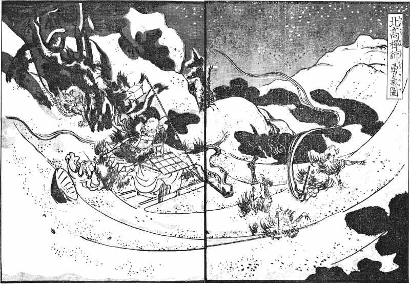 "北高和尚" ("Bhikkhu Hokkō", Kasha's legenda) from the Hokuetsu Seppu (北越雪譜)